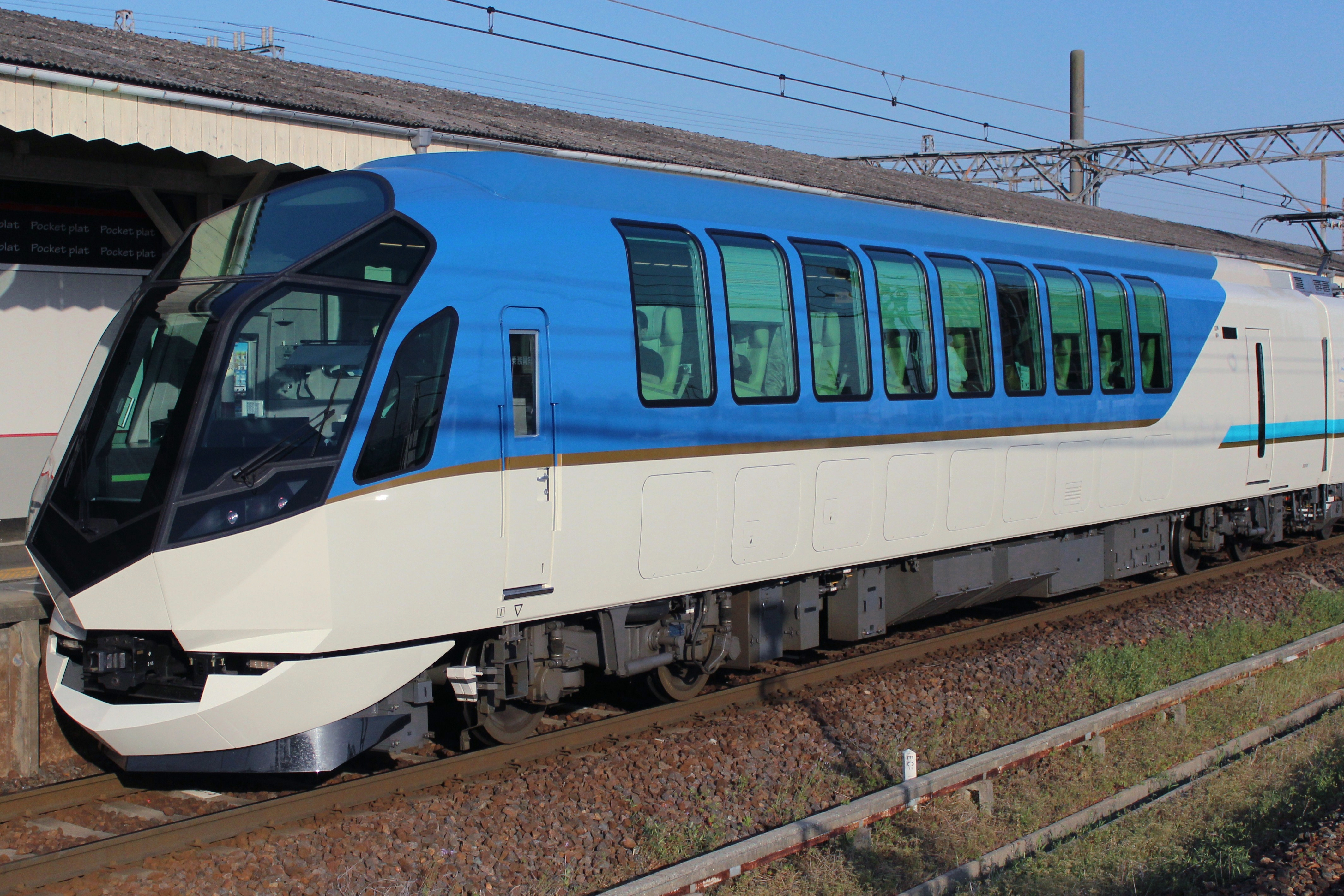 近鉄50000系 ク50100形